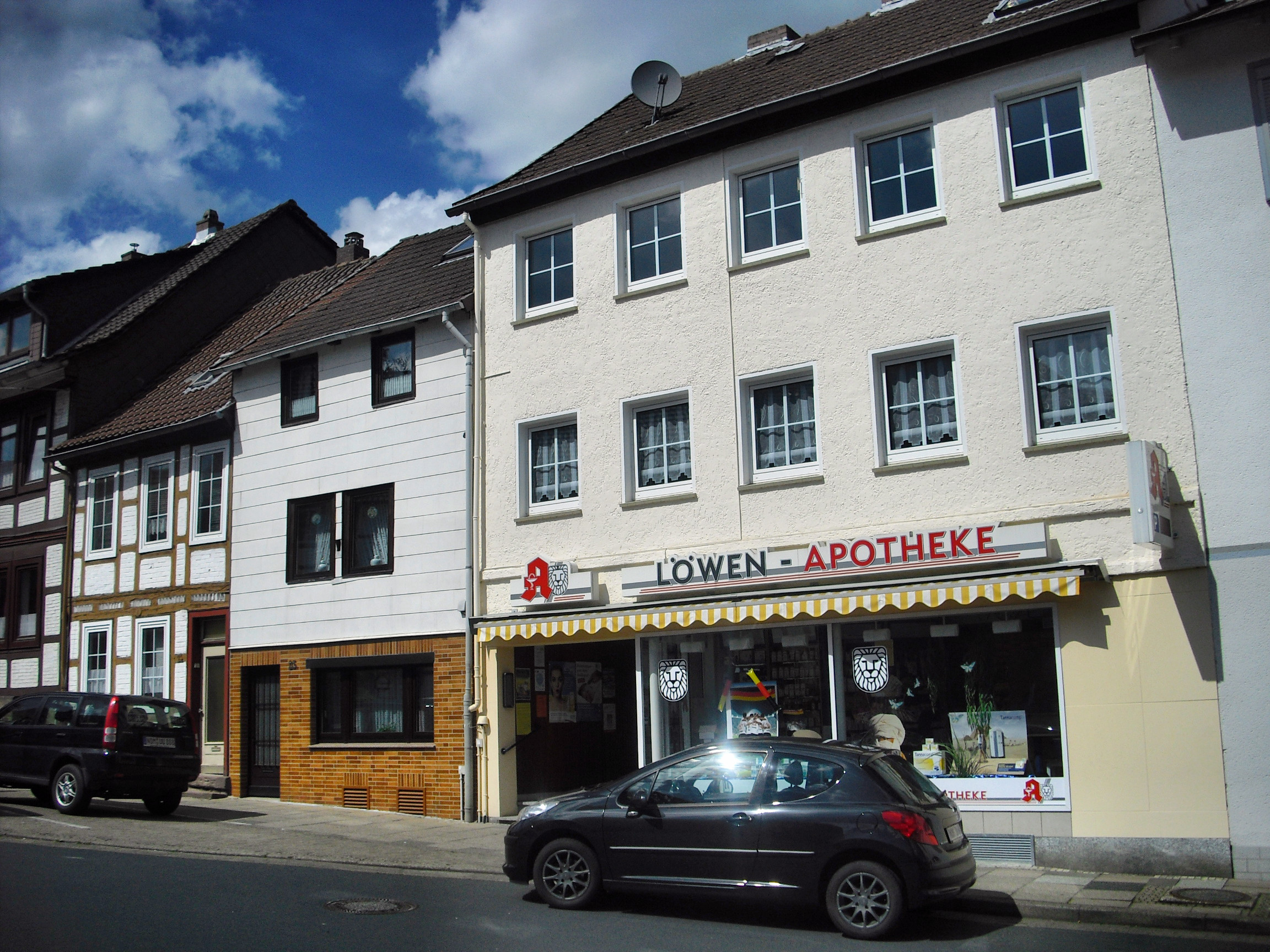 Löwenapotheke Uslar, Standort des früheren baptistischen Bethauses Uslar. Siehe dazu: Friedenskirche